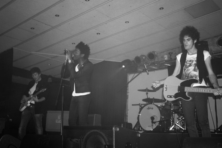 Zenttric a un concert a Barcelona.